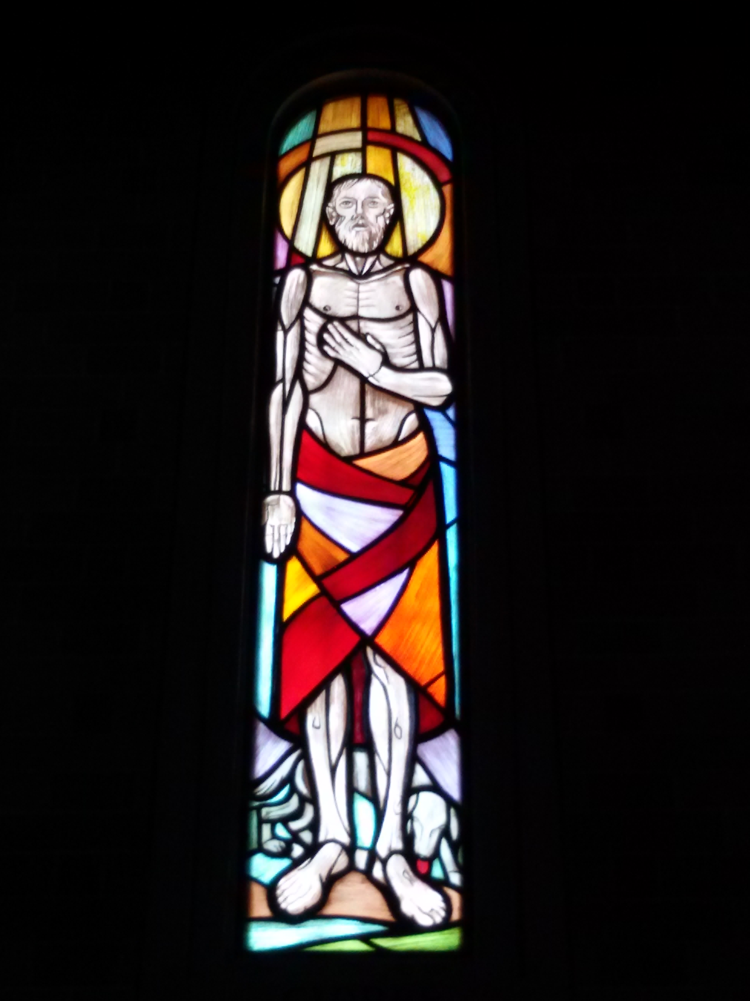 vetrata